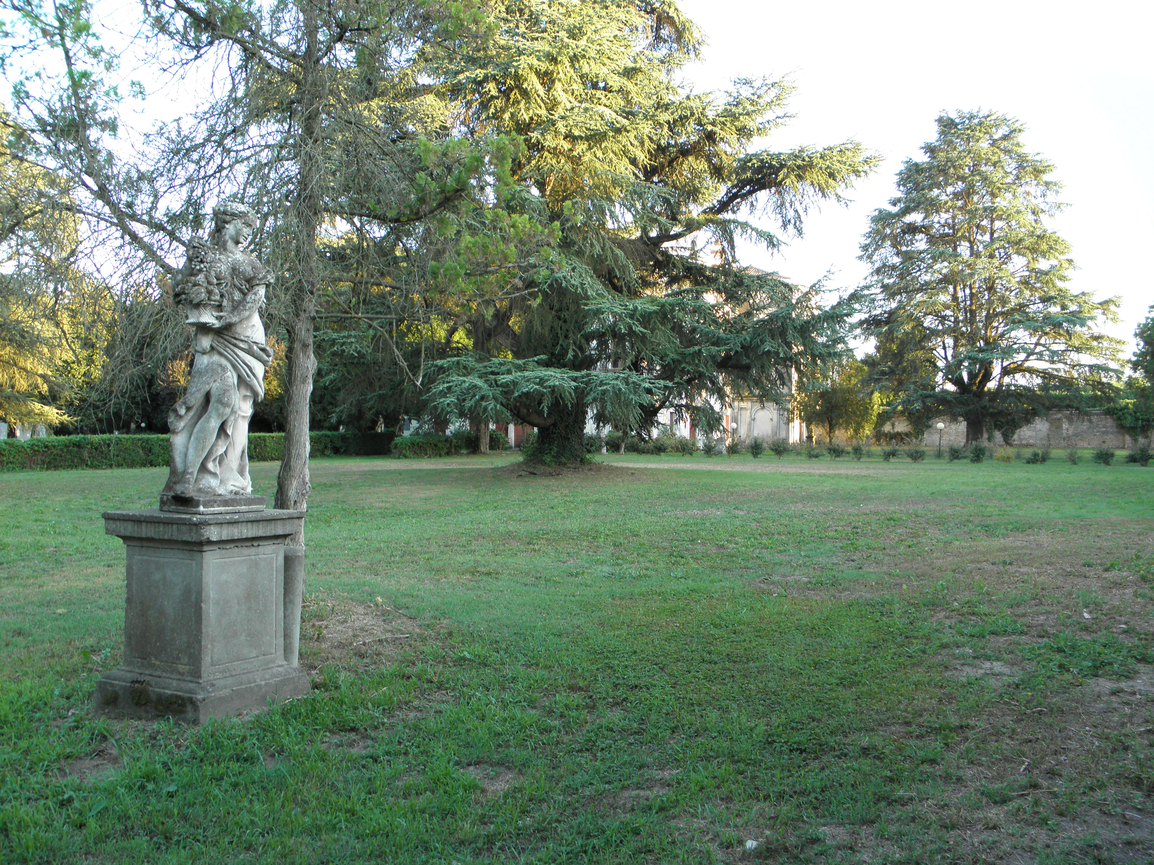 Canda, Villa Nani Mocenigo: il parco situato sul retro della villa.